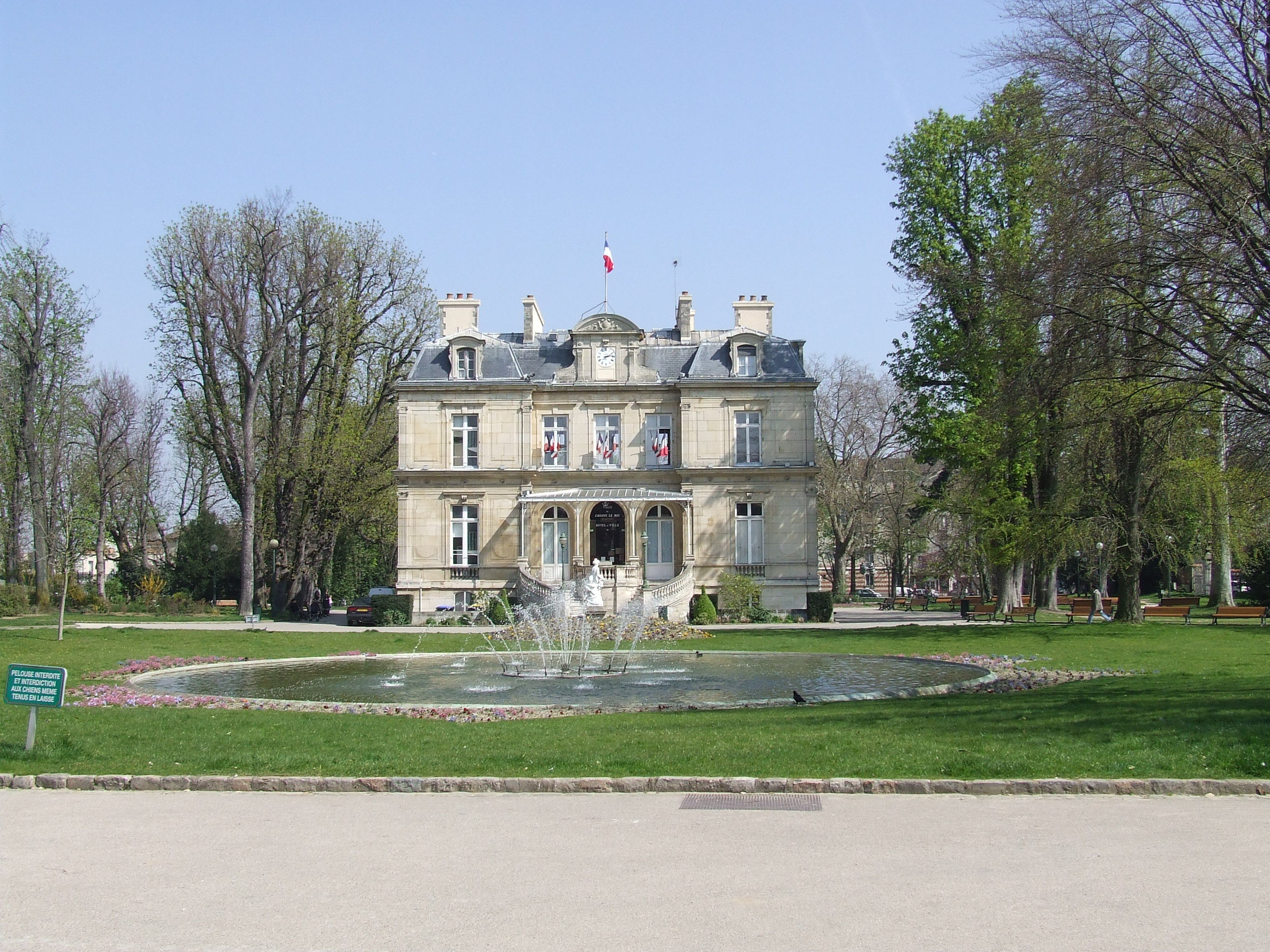 Mairie de Choisy-le-Roi